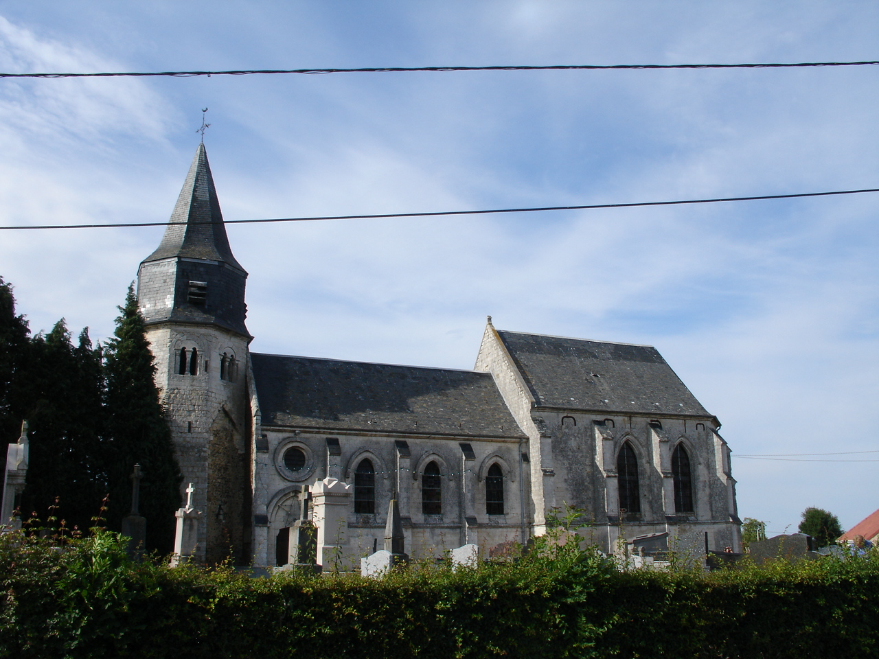 Église de Haut-Loquin